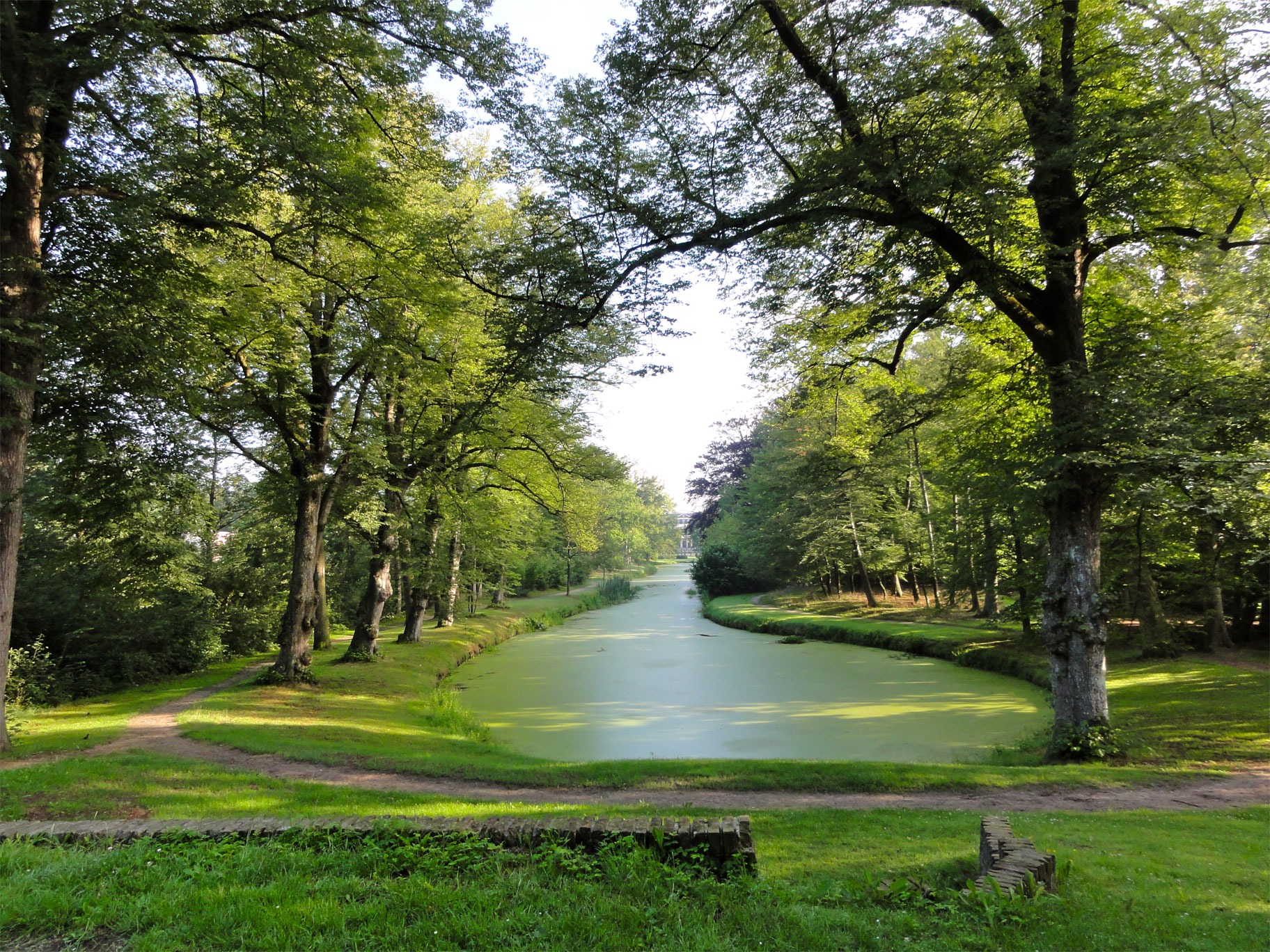 Overtuin van Lyndensteyn Beetsterzwaag